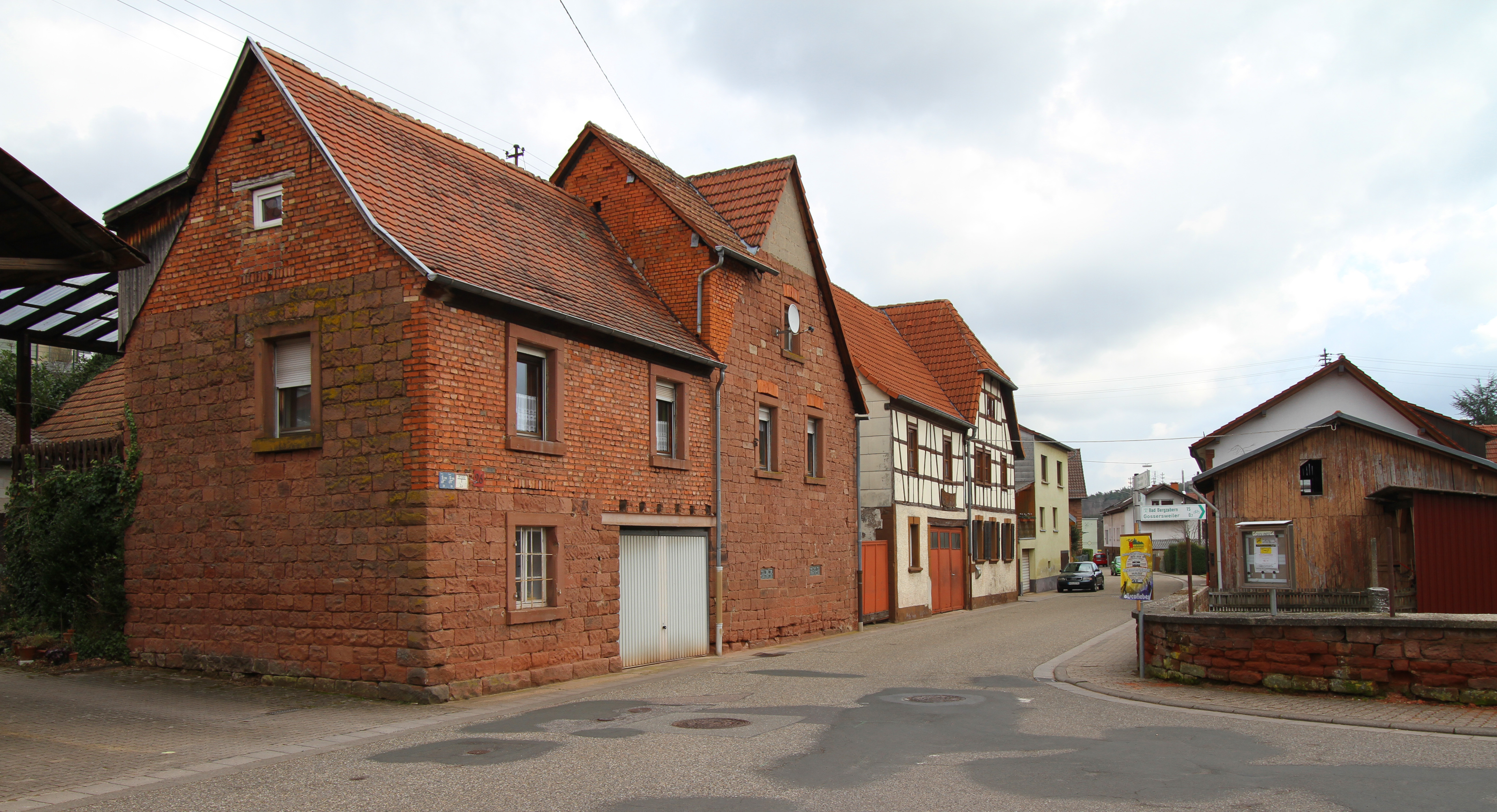 Völkersweiler